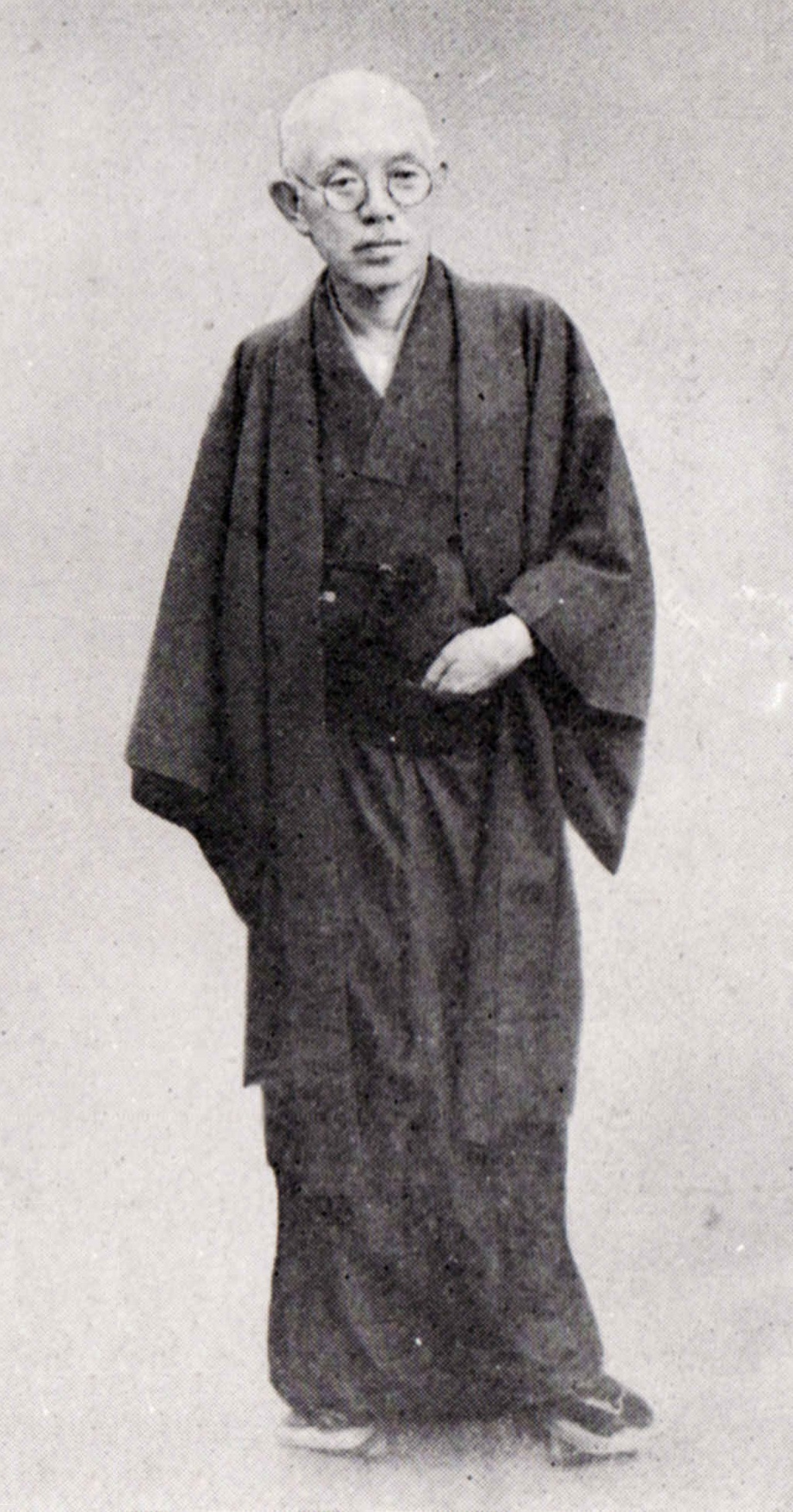 昭和17年撮影、昭和18年刊『書物展望』に掲載。